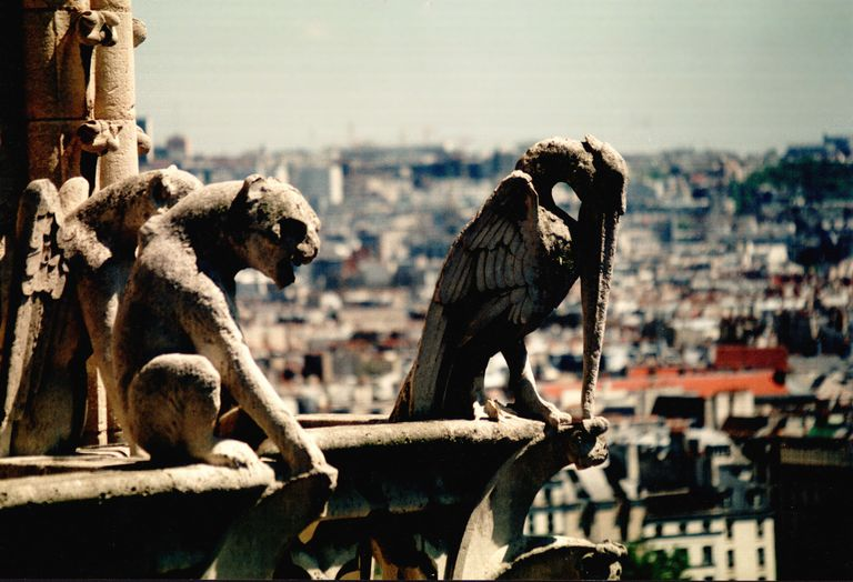 Figuren (Chimären) auf der Notre Dame (Paris)